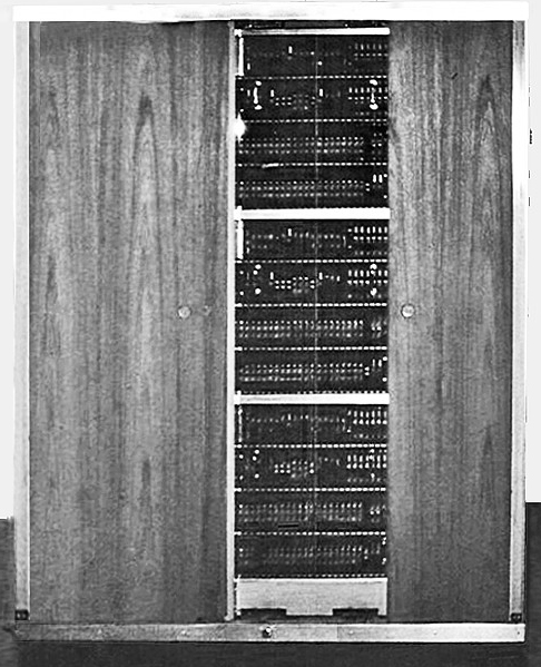 Skříň počítče Gier s procesorem